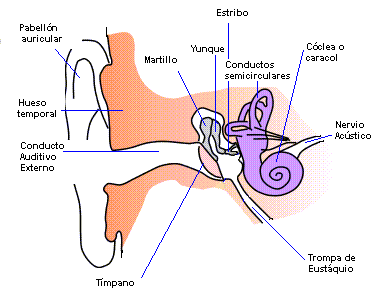 Modificación de Ear-Anatomy.pgn para le es.wikipedia.